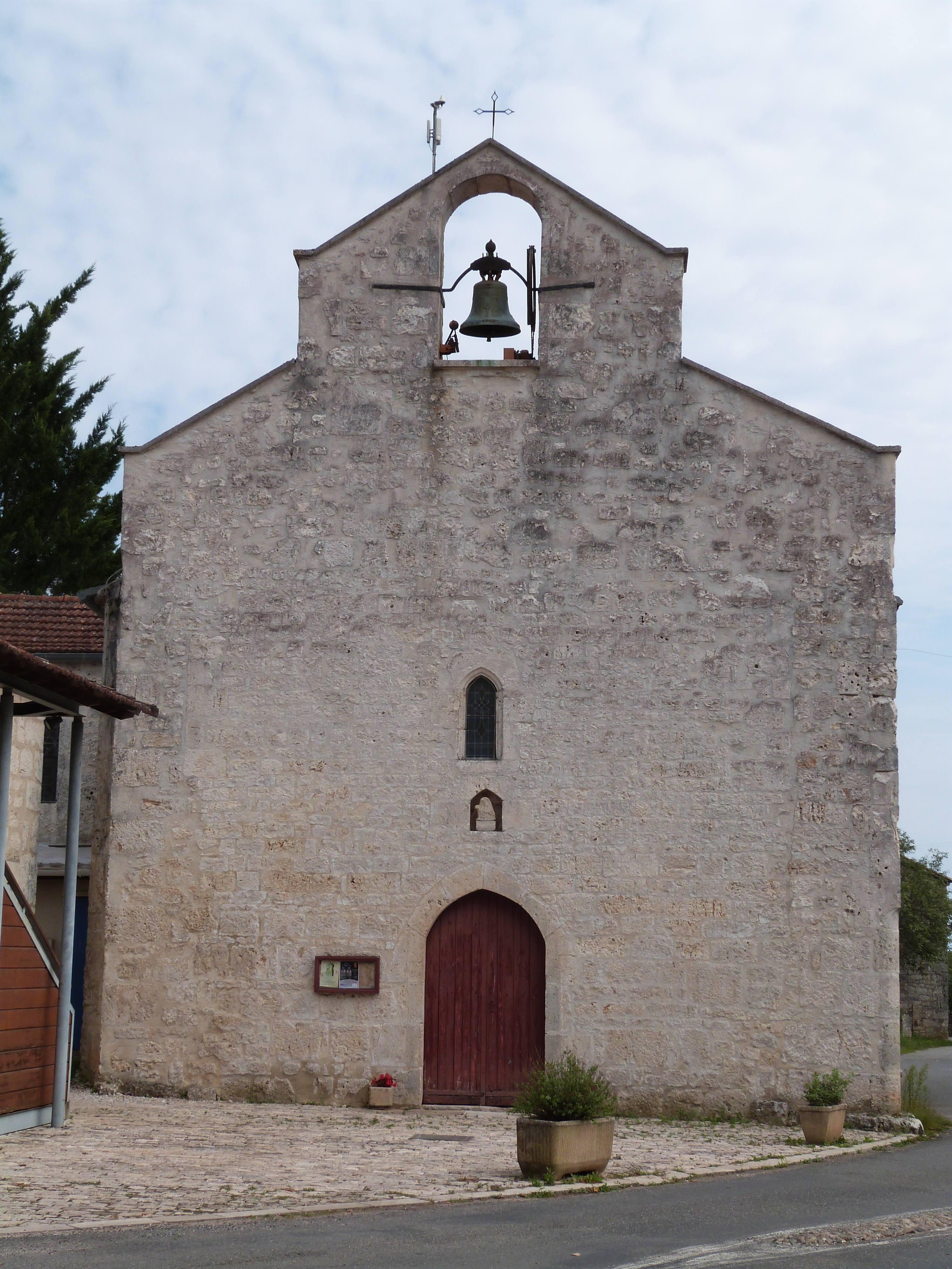 Façade de l'église Saint Roch à Laburgade